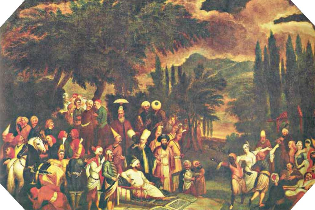 Kazancıoğlu Gardens, place where today Çırağan Palace stands